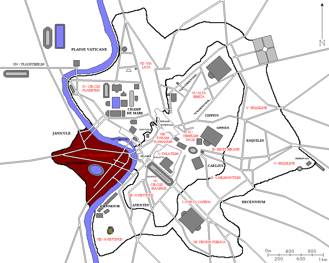 Plan de Rome avec la quatorzième région des 14 régions d'Auguste